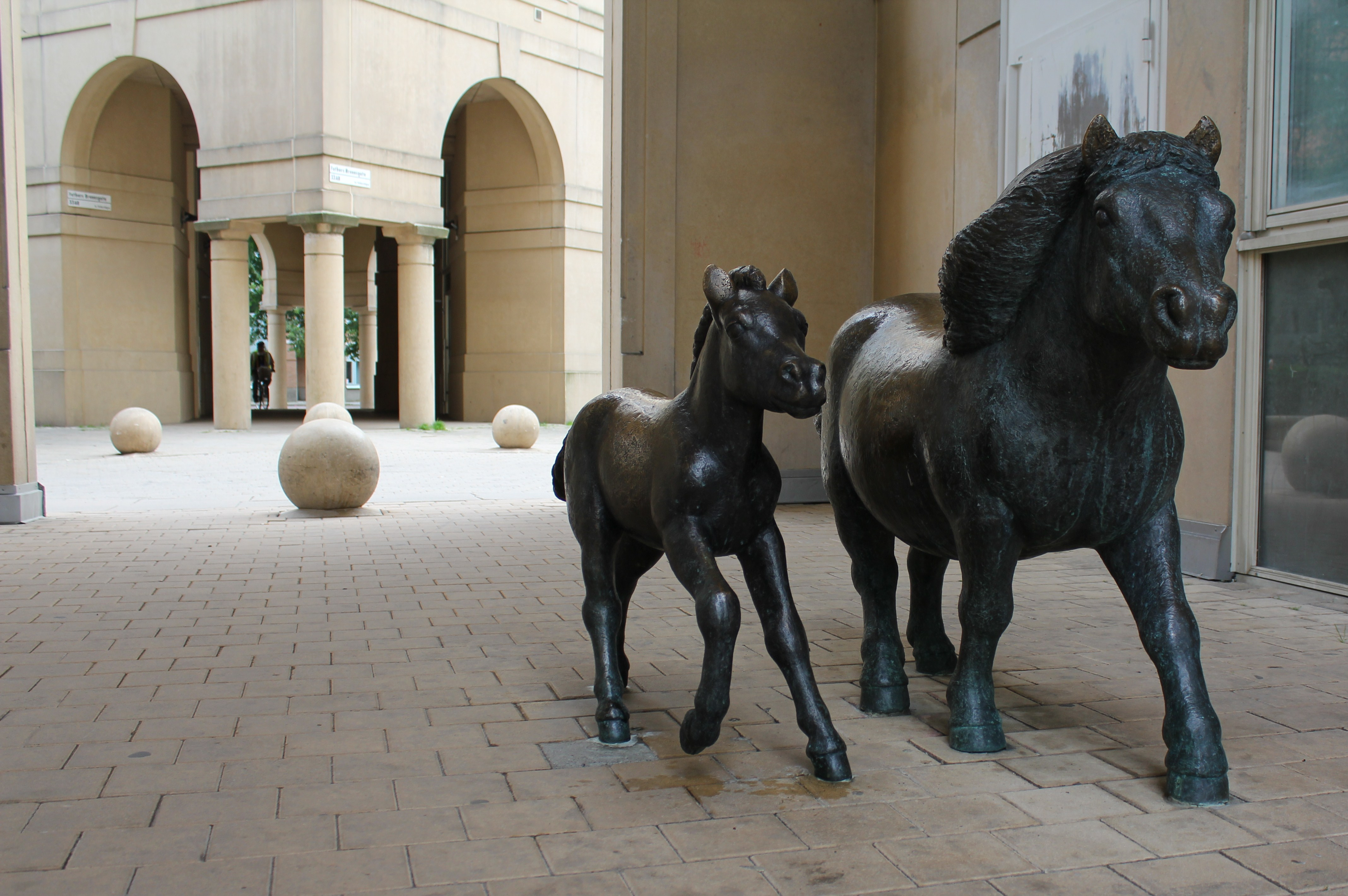 Daphne och Olle av Aline Magnusson, 1992. Skulptur i Bofills båge, Södermalm, Stockholm.